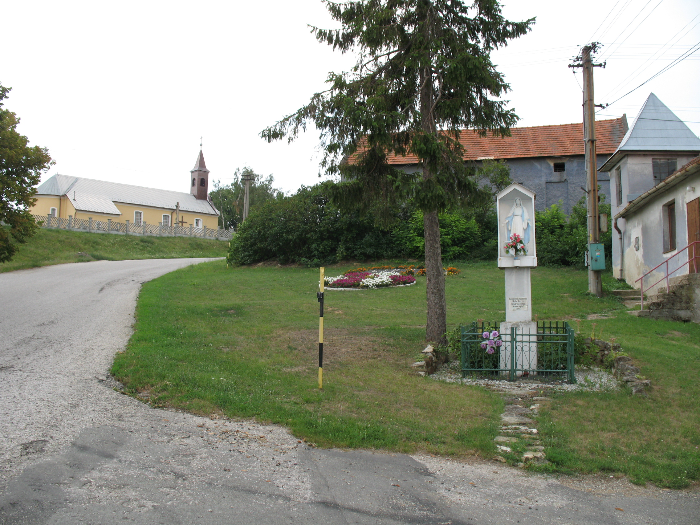 Libád központja